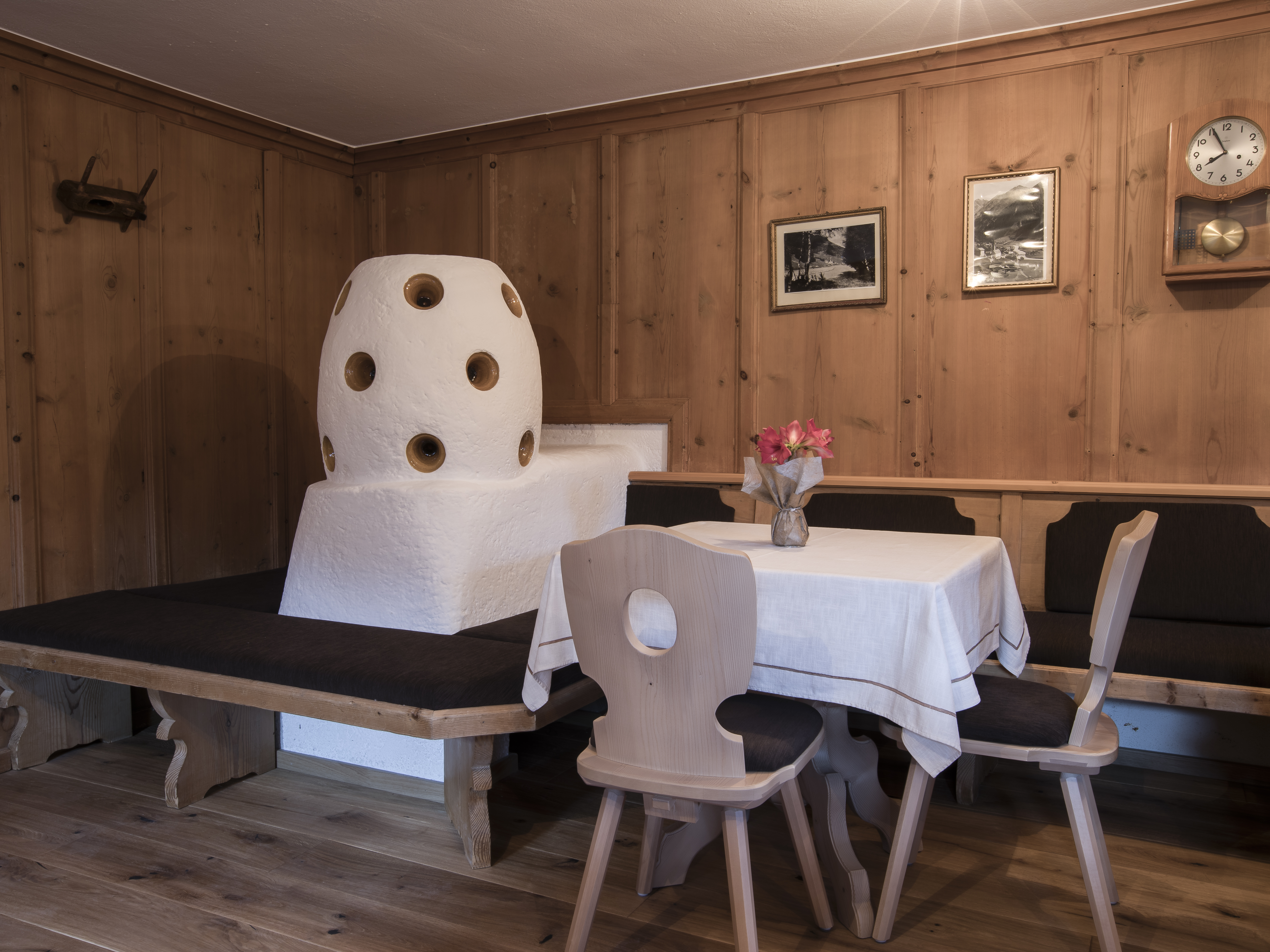 Stube im Berghof Sölden